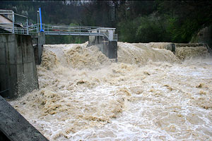 Wasserkraftwerk Freienstein